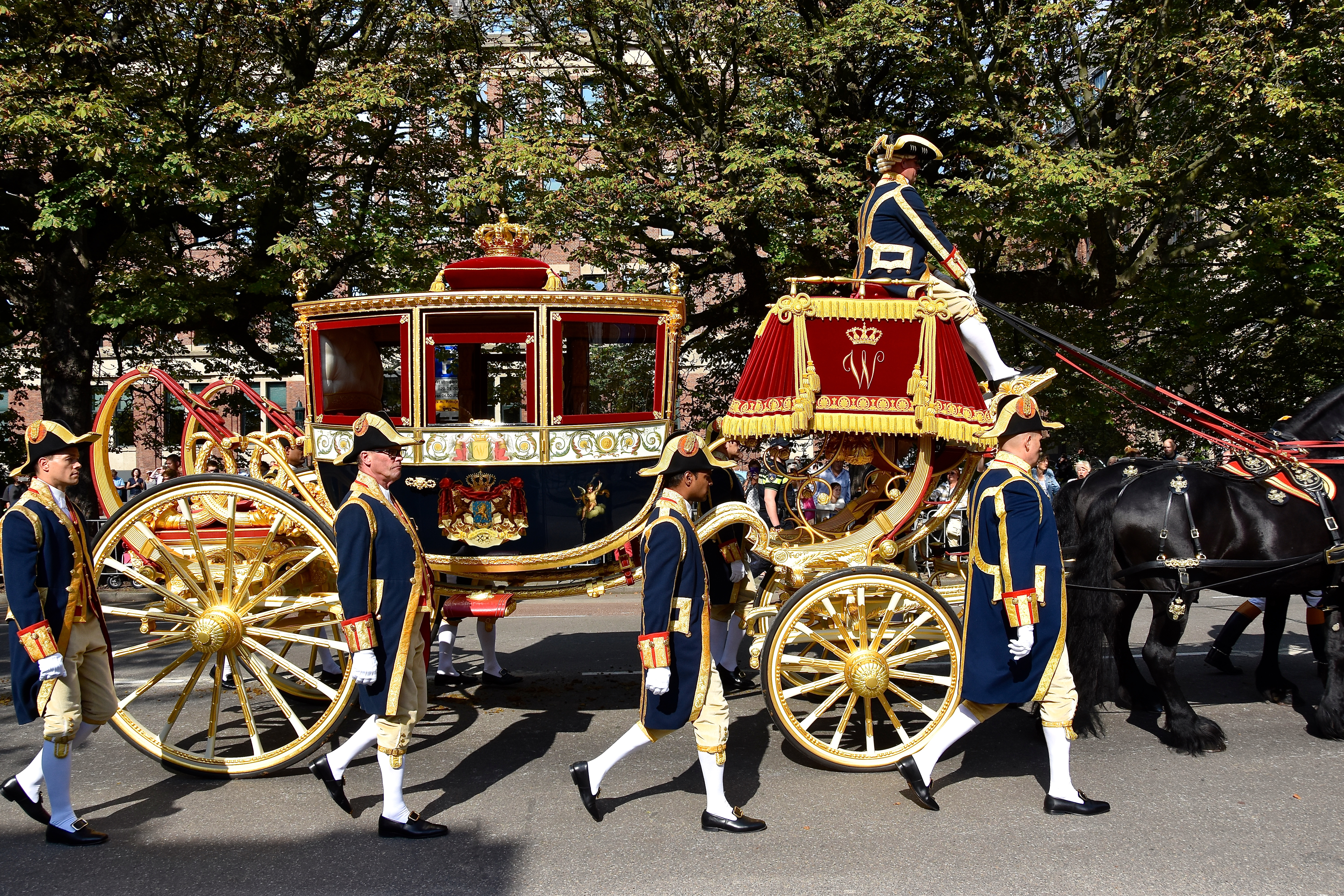 De Glazen Koets op de Hogewal. De Glazen Koets is een van de twee gala-berlines van het Nederlandse Koninklijke Staldepartement. De naam van de koets is ontleend aan het glas dat de ornamentenrand beschermen moet. De koets staat in de Koninklijke Stallen in Den Haag. Bron